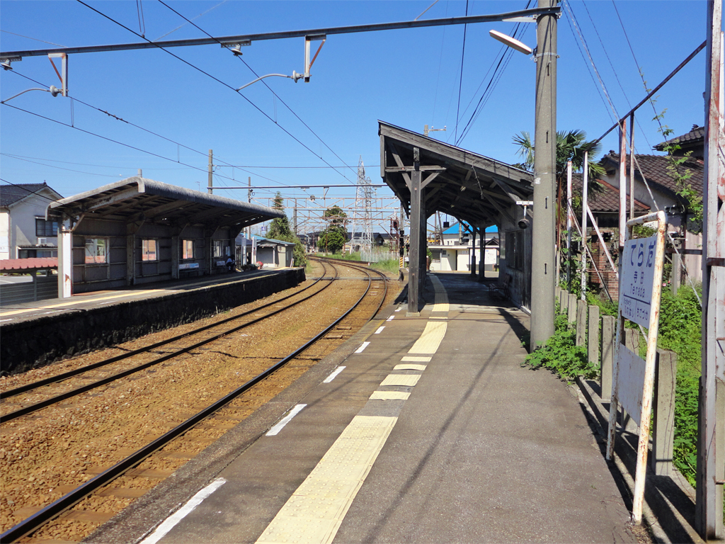 富山地方鉄道寺田駅 ホーム（立山線）